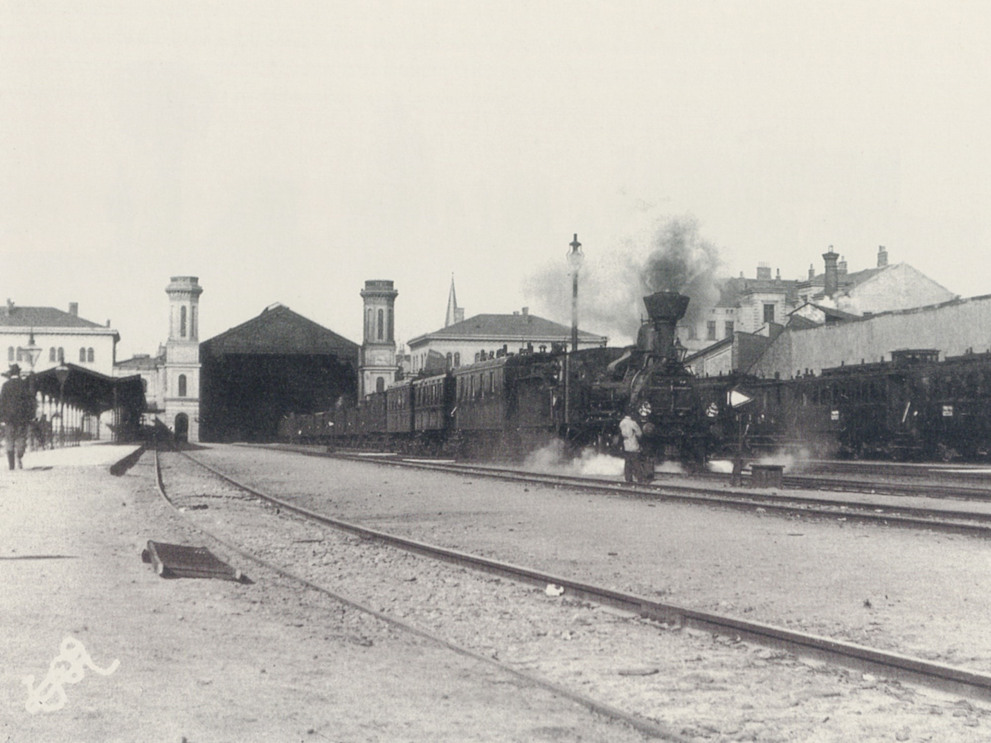 de: Der Kaiserzug verlässt Wien Westbf en: The imperial train leaving Wien Westbahnhof (Vienna western station)